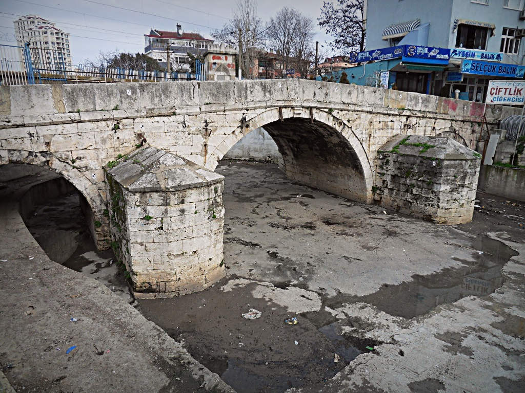 Bostancı'da bulunan Bostancıbaşı Köprüsü.